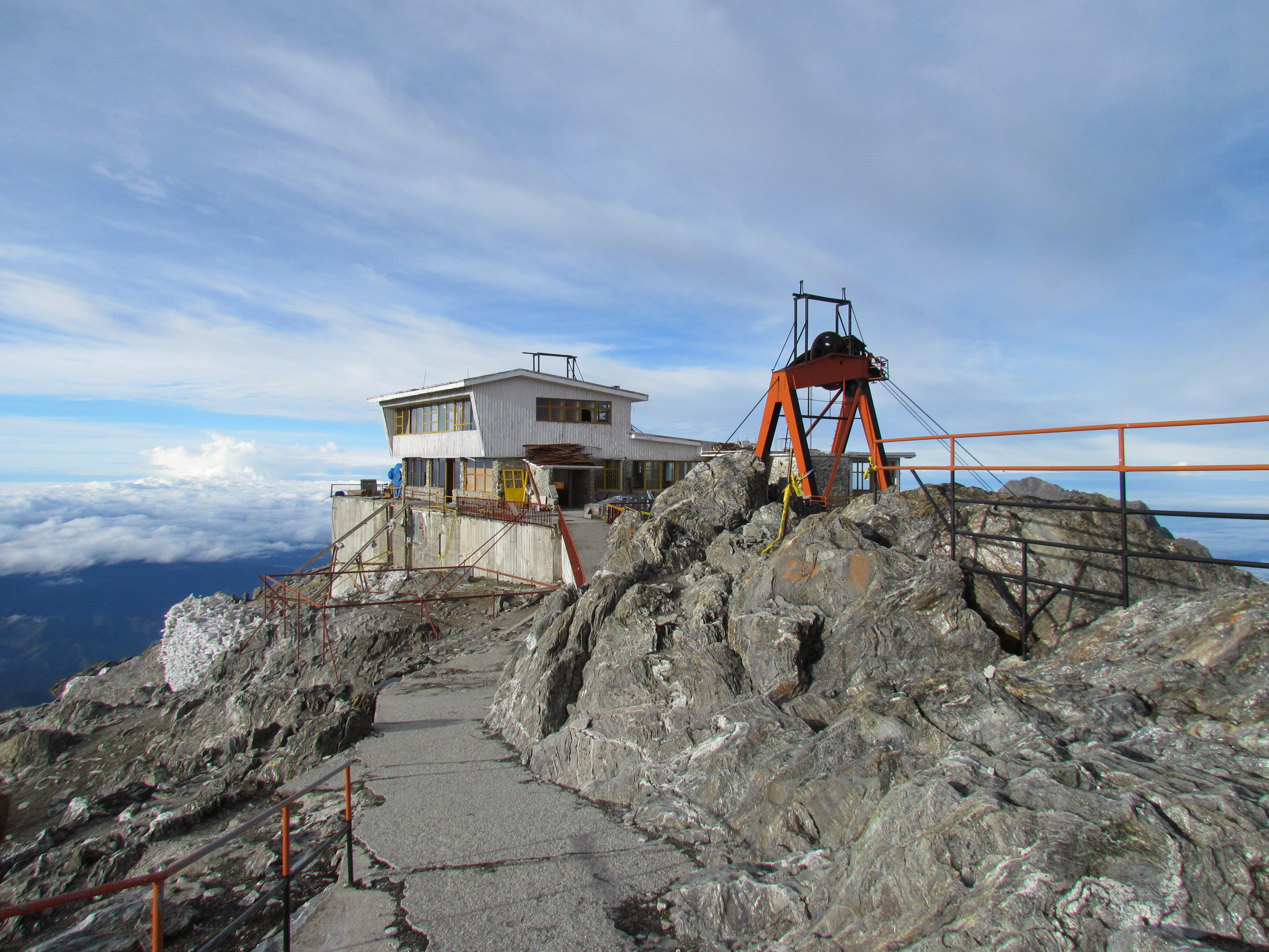 Estación Abandonada Pico Espejo del Teleférico de Mérida